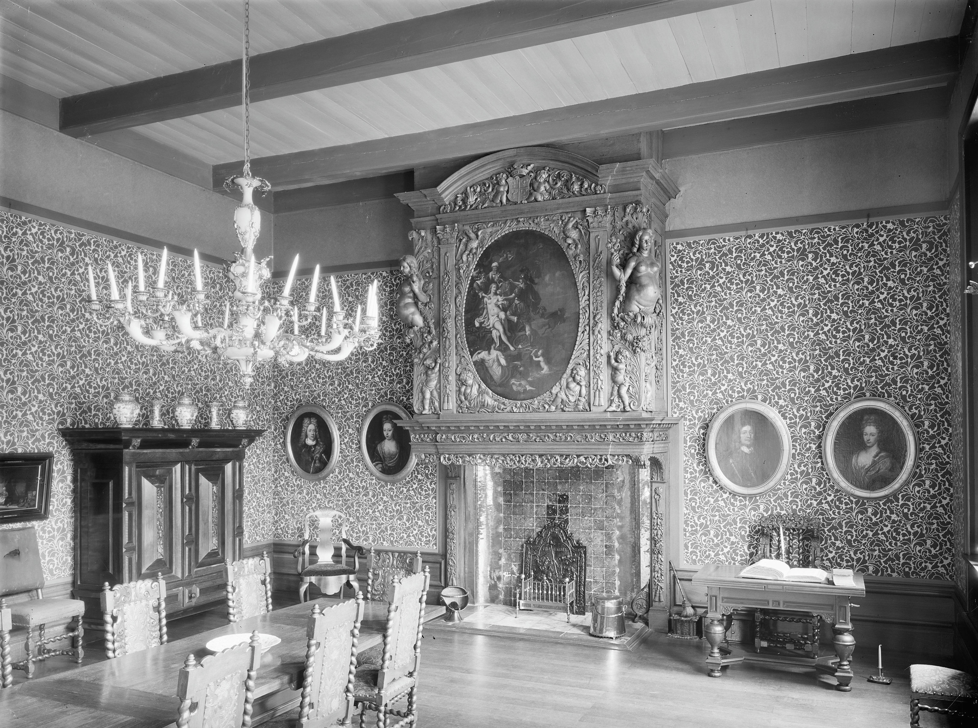 Menkemaborg: interieur Middenzaal